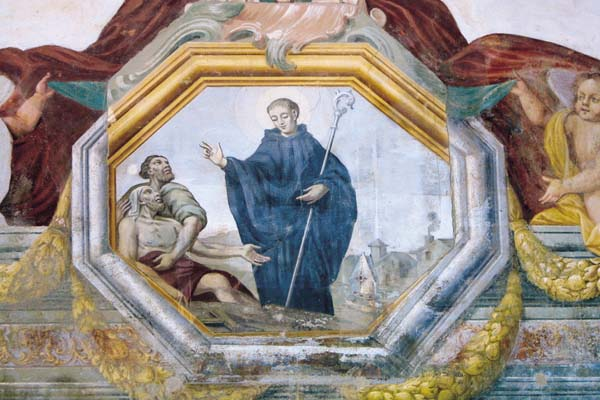 Bernard de Clairvaux, thaumaturge.